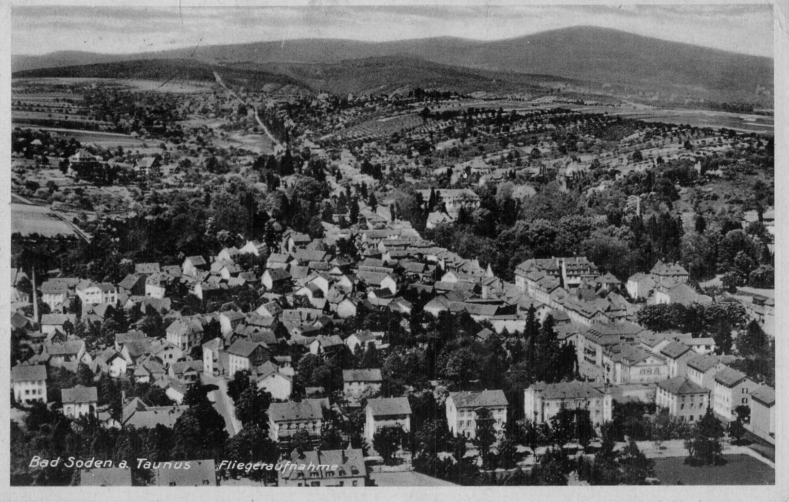 Ansicht Bad Soden am Taunus 1937